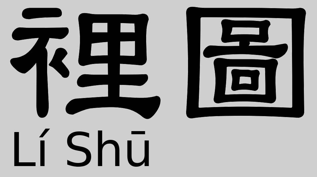 Style de caractère Lí Shū